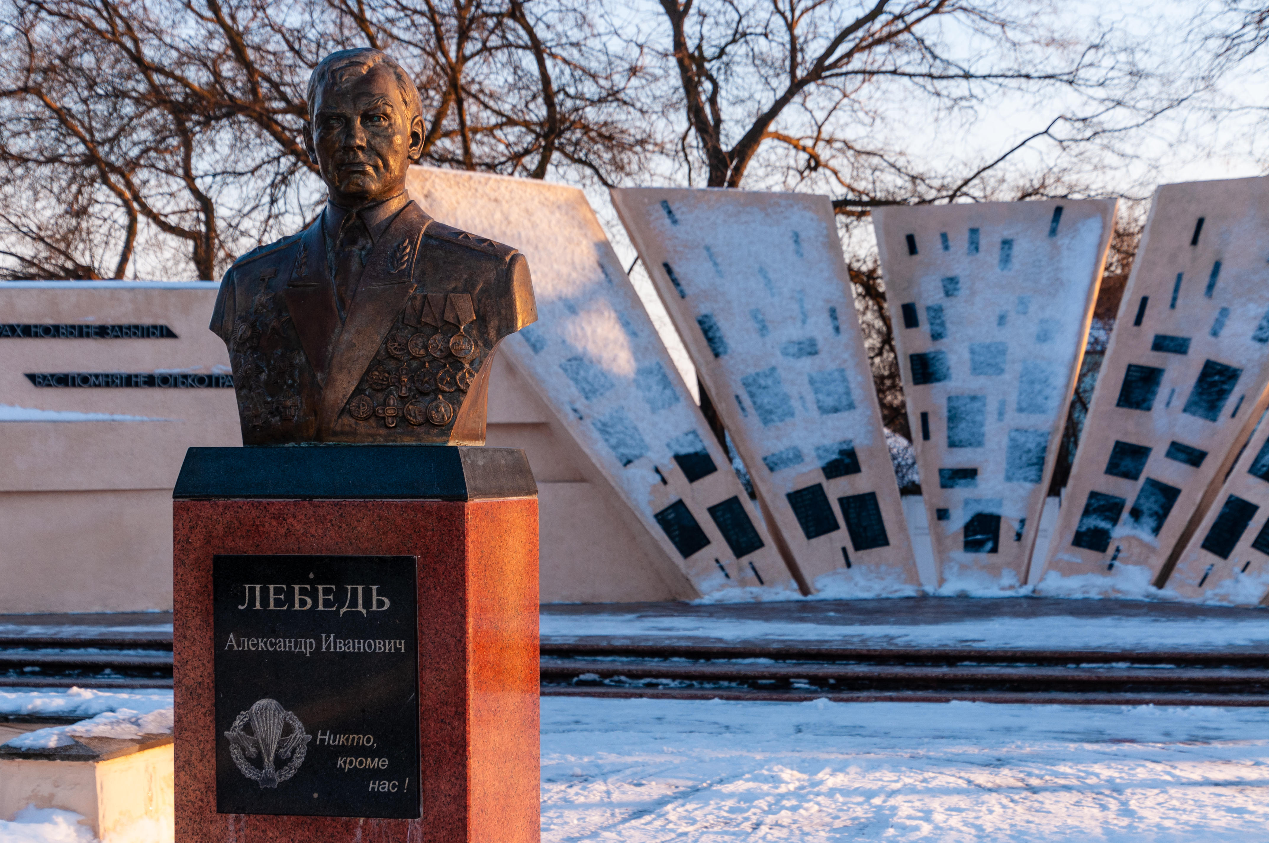 Bender, Pridnestrowien, Denkmal Alexander Lebed am Panzerdenkmal